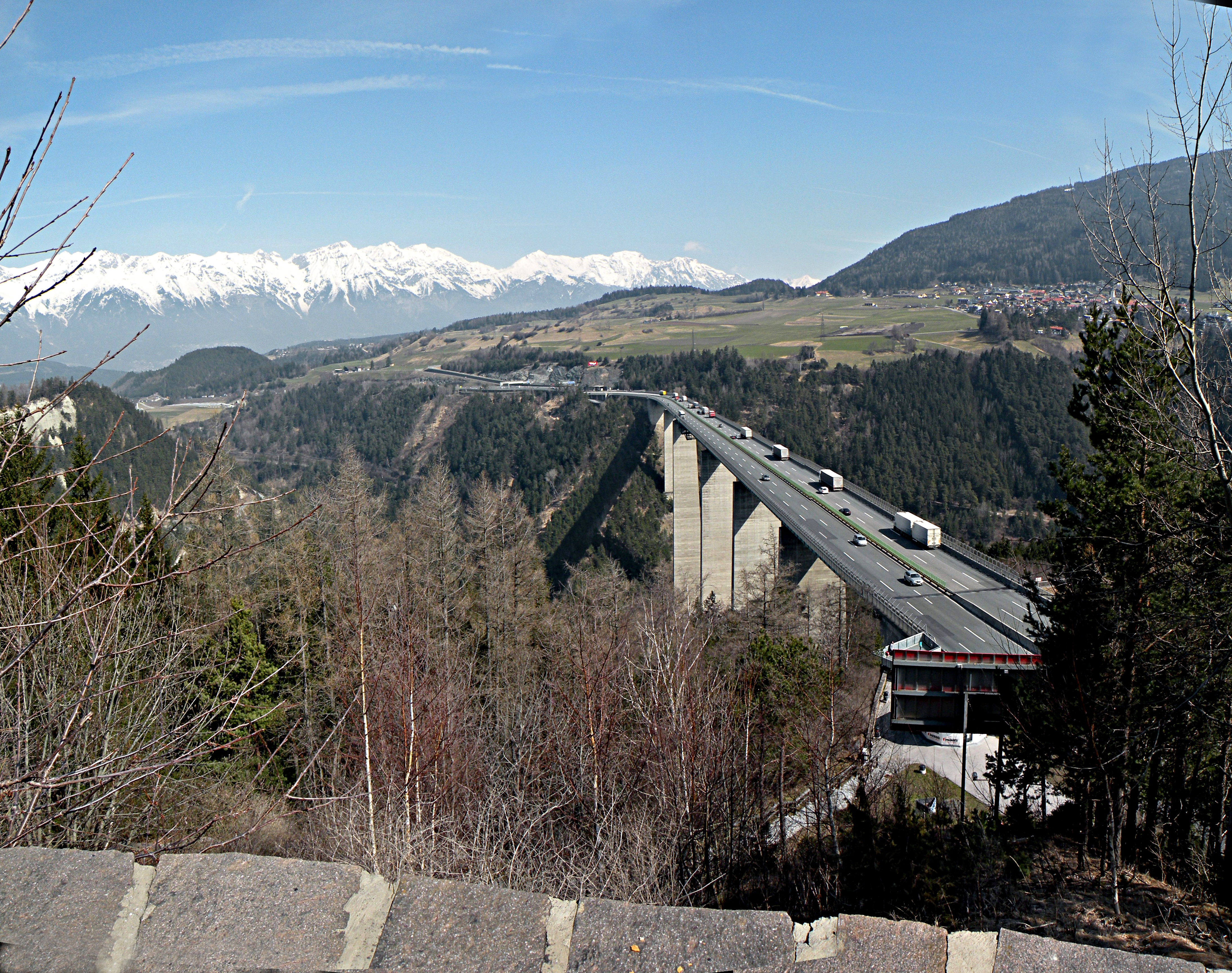 Евромост у перевала Бреннер